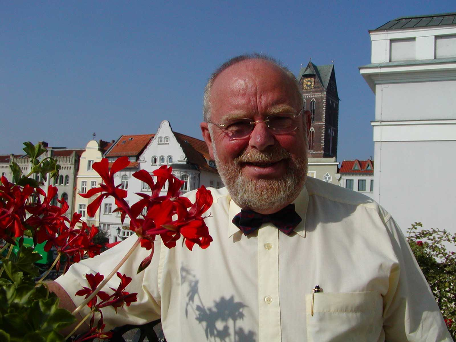 Foto Detlef Schmidt